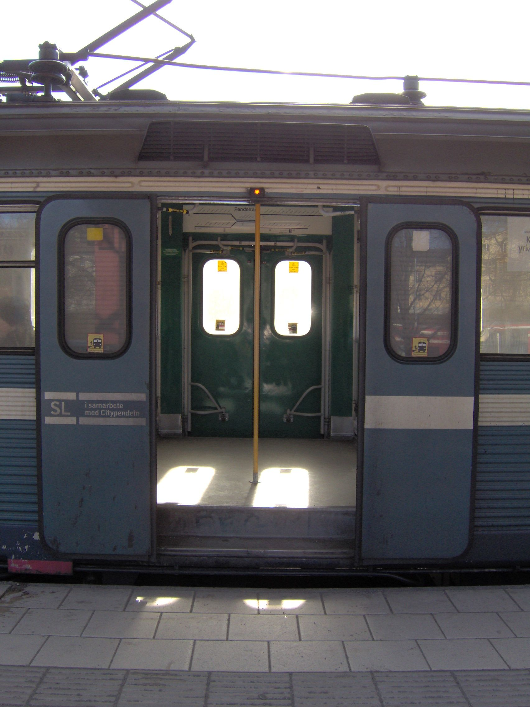 Dörrarnas öppning på en X1.jpg